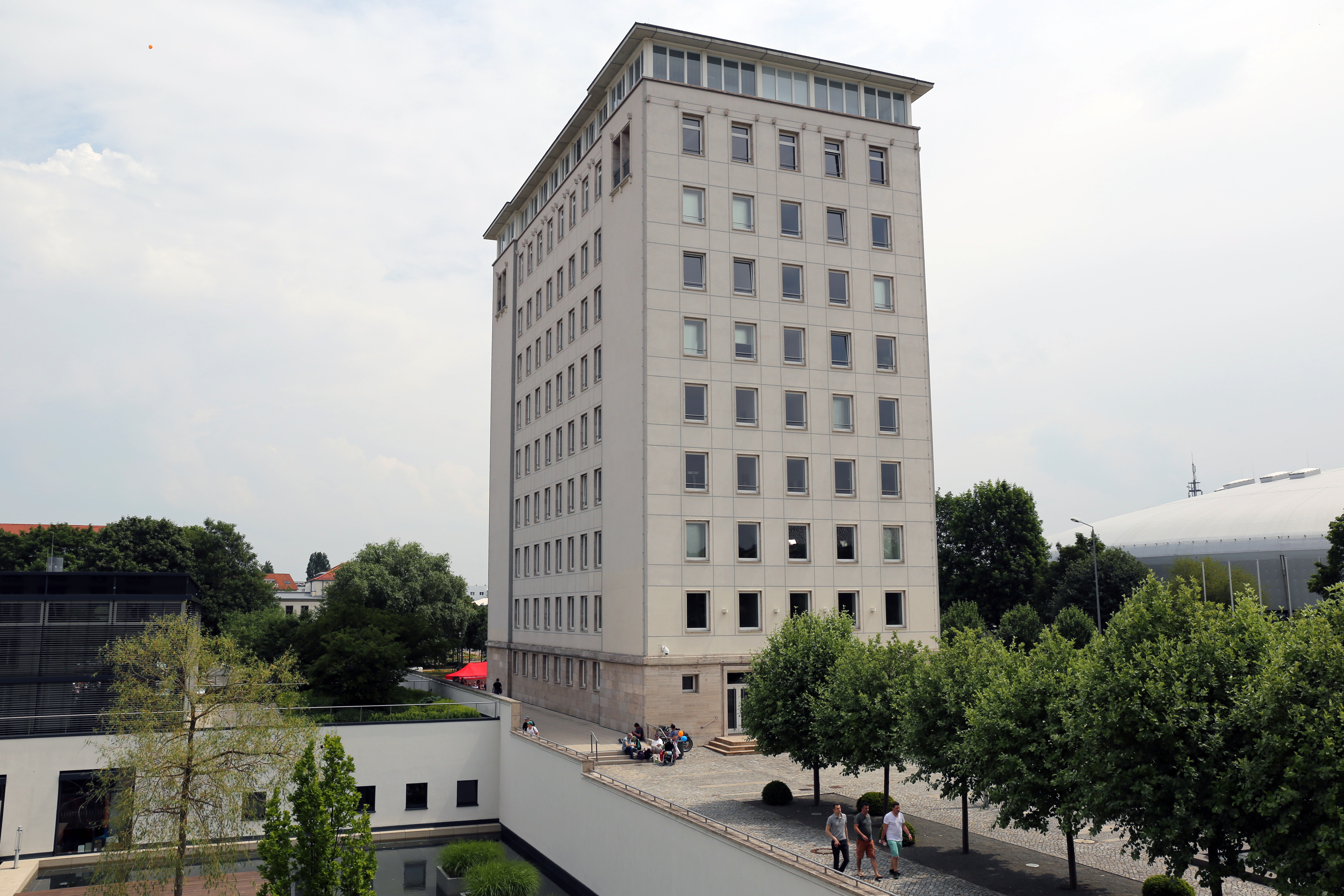 Hochhaus und Bürotrakt des Thüringer Landtages in Erfurt